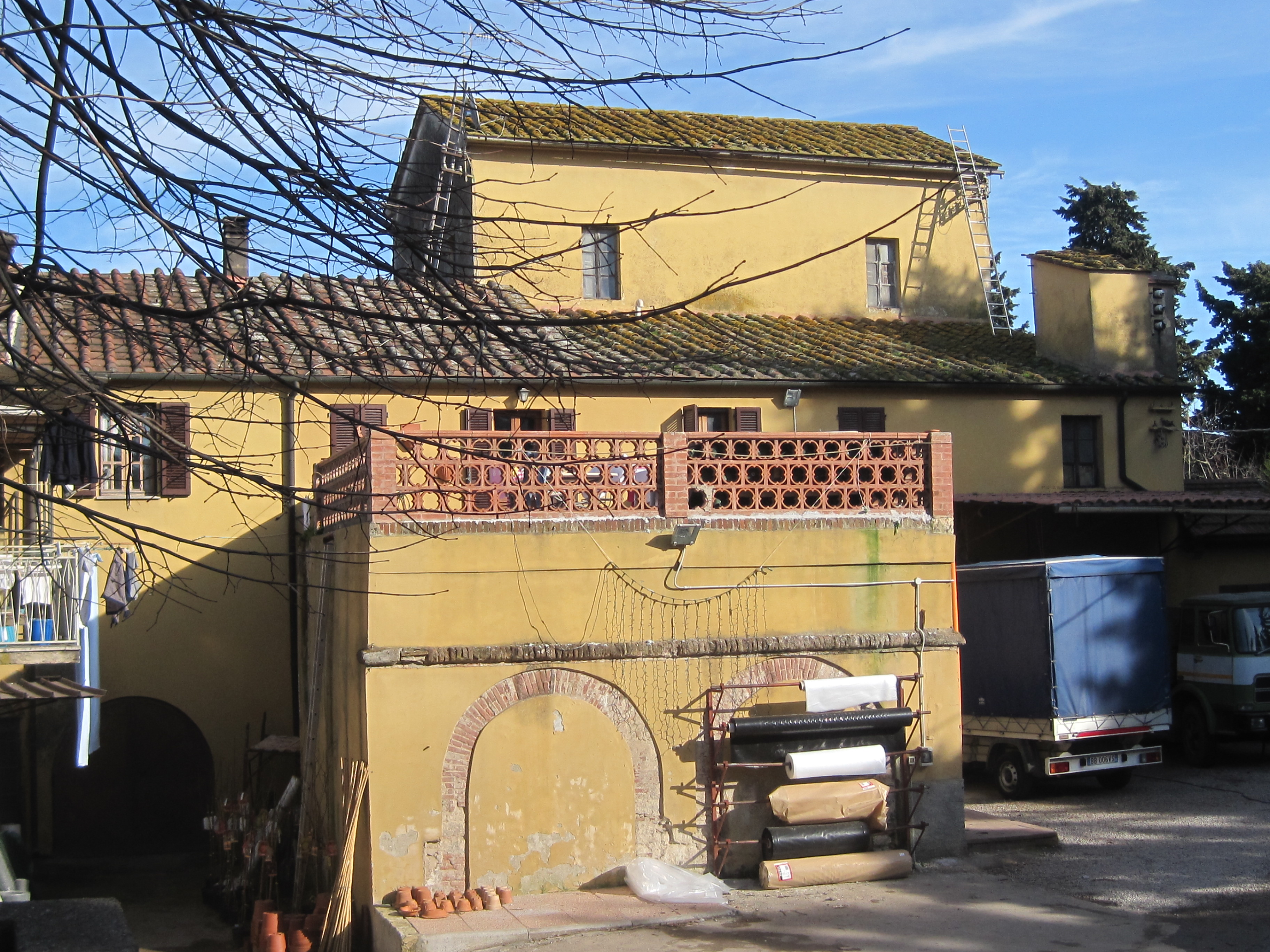 Struttura dei magazzini, con mulino e forno fusorio delle ferriere di Valpiana (GR)